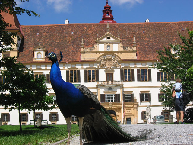 Schloss Eggenberg: Lizenz: GNU FDL Quelle: Foto Benutzer:Plp|plp Benutzer Diskussion:Plp Datum: de:2004 Ort: Graz, Steiermark